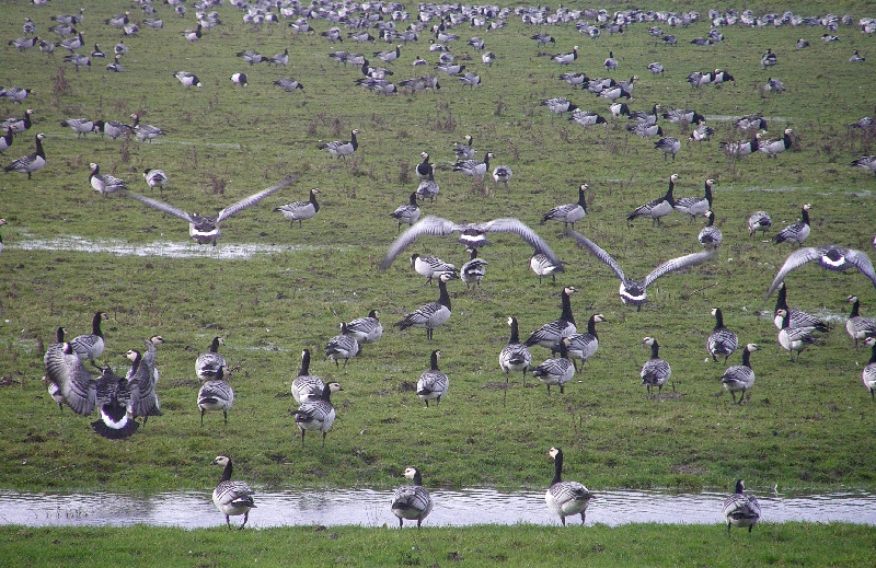 Bild von den Elbmarschen bei Freiburg (Elbe)